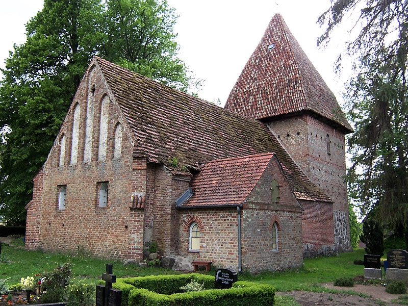 Kirche in Wiendorf (Mecklenburg)